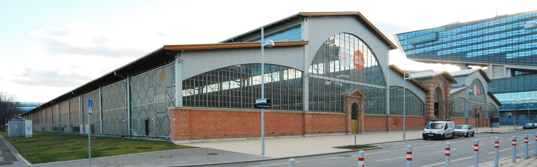 Karl-Farkas-Gasse # Maria-Jacobi-Gasse, 1030 Wien, Zentral-Viehmarkt St. Marx - Rinderhalle